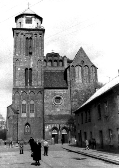 Kolegiata 1. Autor:Władysław Goliński